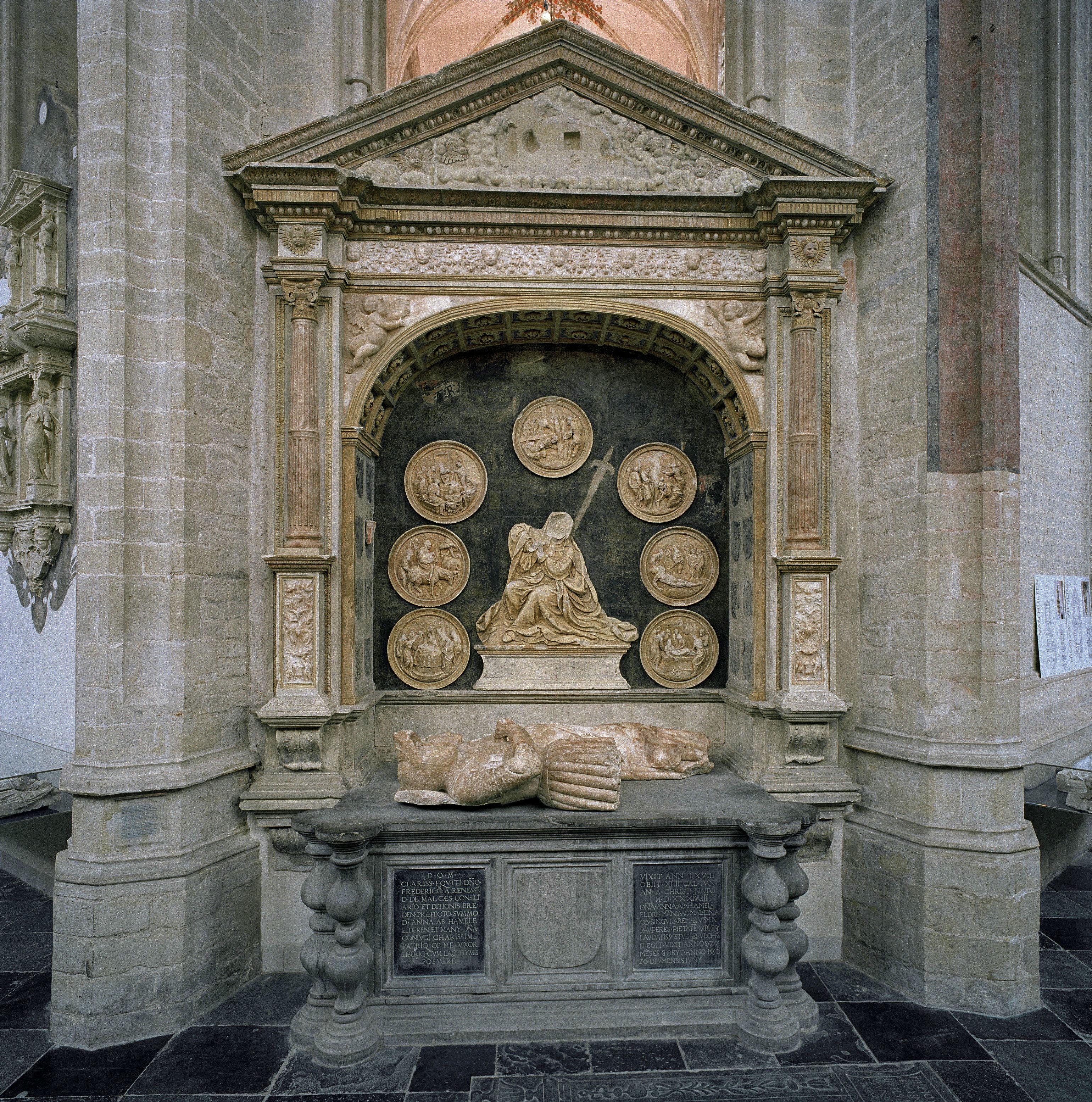 Onze Lieve Vrouwe Kerk: Interieur, detail, grafmonument van Frederik van Renesse